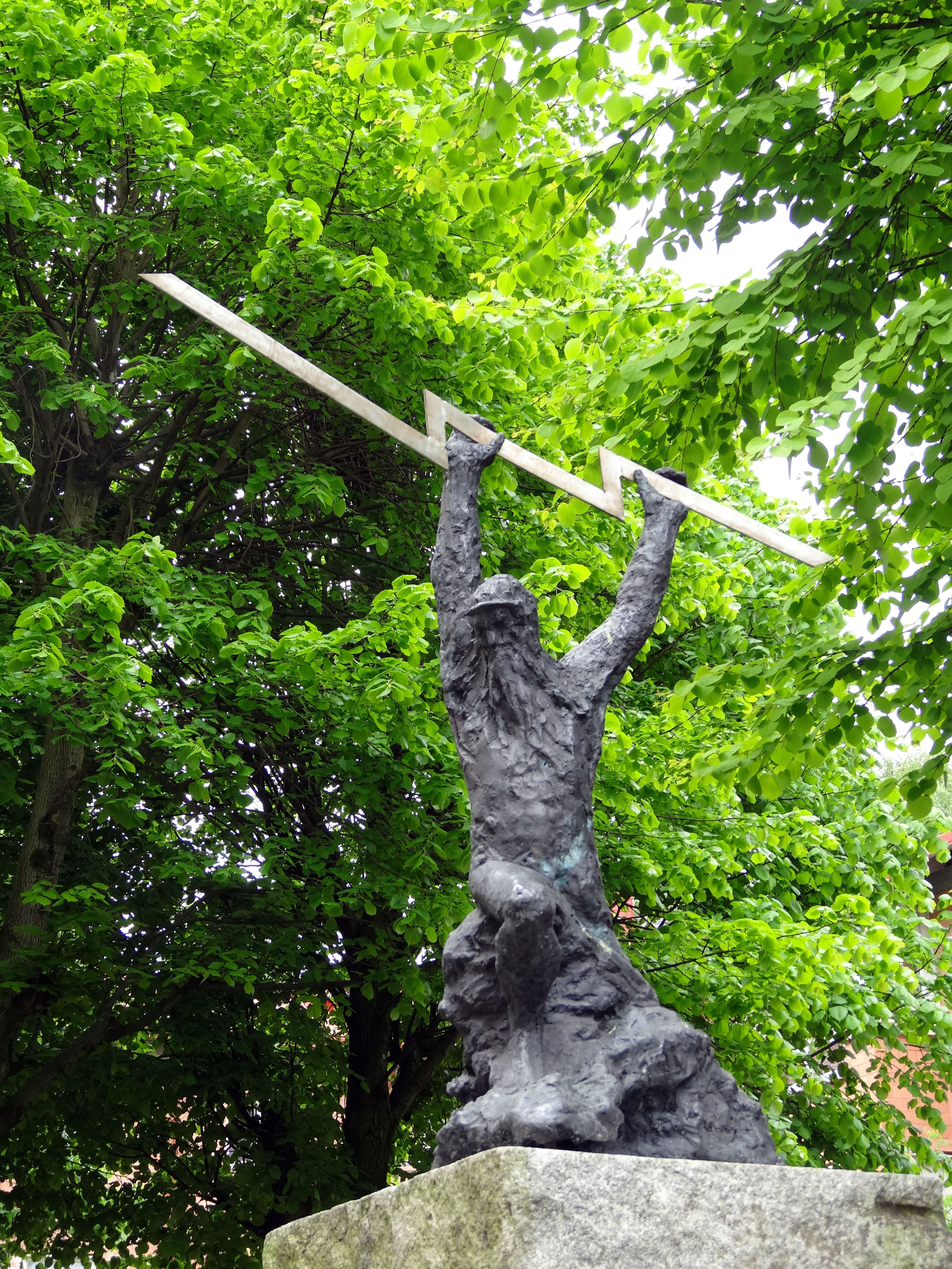 Blixt och dunder av Anne Lagergren, 1994. Norra Fjädermolnsgatan, Biskopsgården, Göteborg.